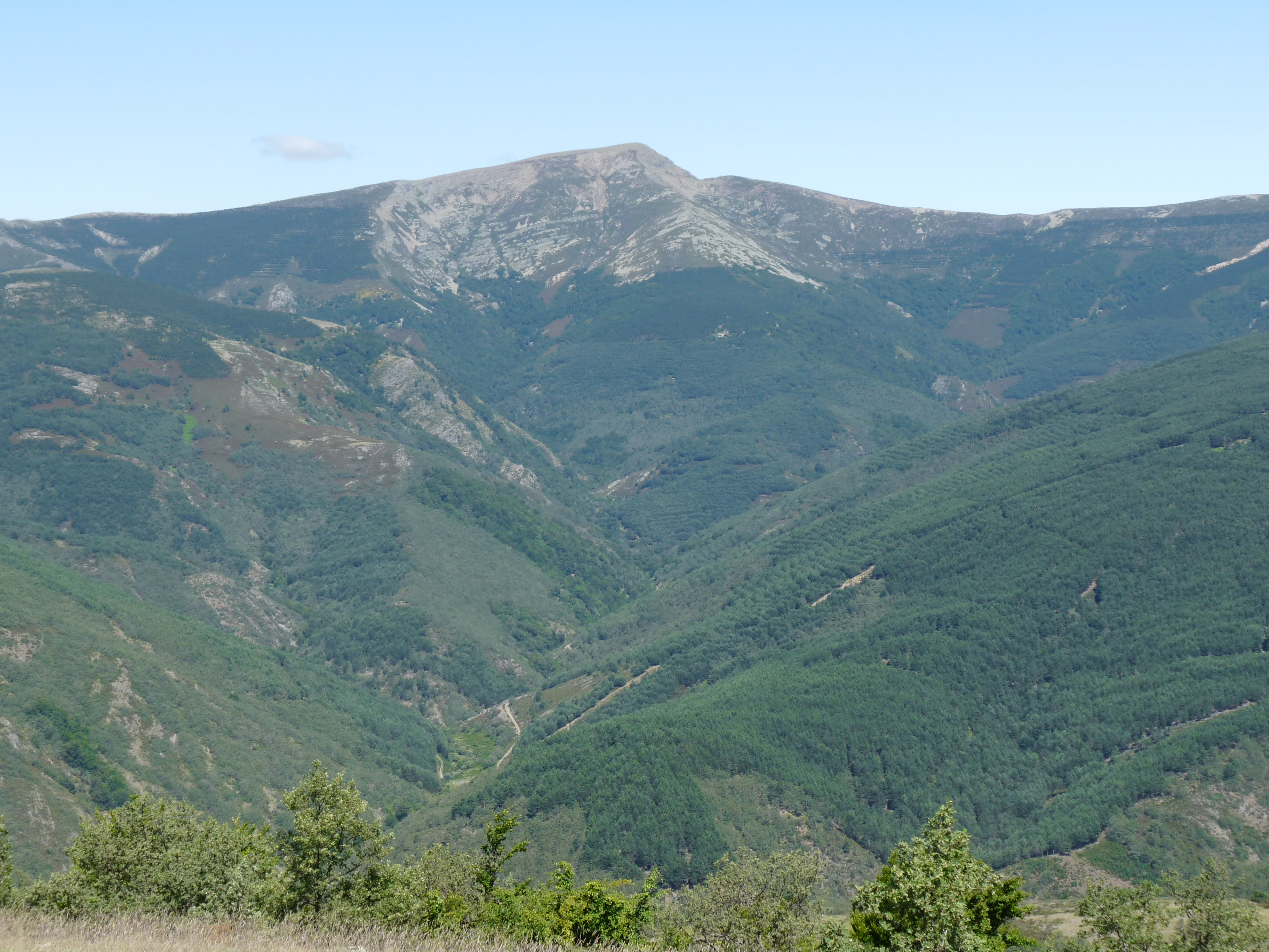 Vista de la ladera sur del Pico San Millán (2131m) en Barbadillo de Herreros